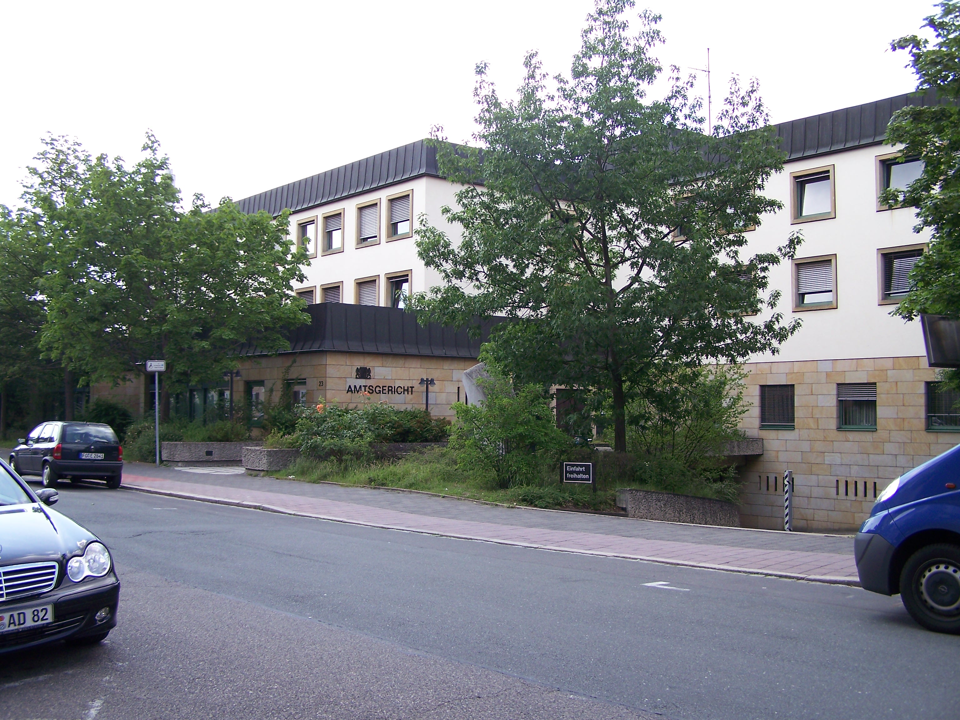 Das Bild stellt einen Großteil des Neubaus des Amtsgerichts Erlangen dar.